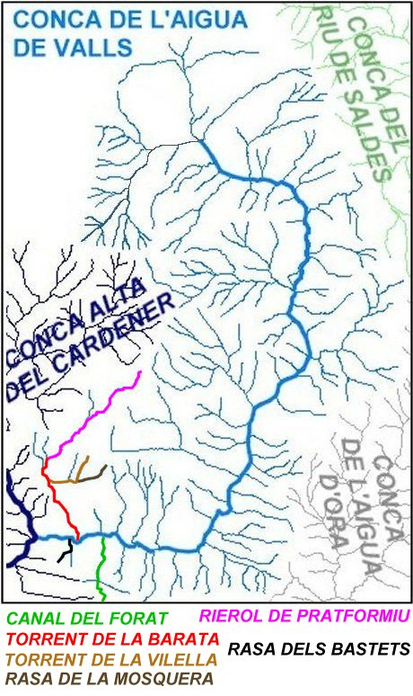 Mapa de la conca de l'Aigua de Valls (afluent del Cardener) en el qual s'hi han destacat els següents afluents: la Canal del Forat, el Torrent de la Barata, el Rierol de Pratformiu, el Torrent de la Vilella, la Rasa de la Mosquera i la Rasa dels Bastets.